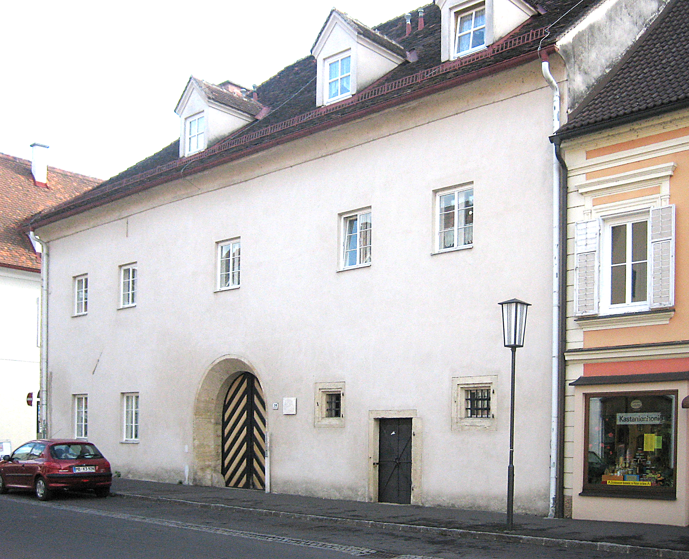 Pistorkaserne